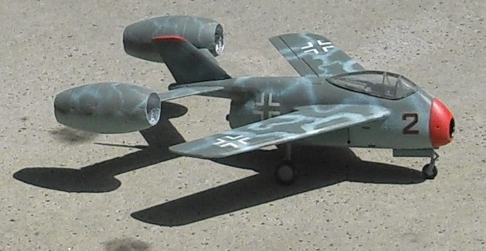 Modell des Entwurfs Fw Super Lorin der Reihe Ta 183. Maßstab 1/72, Basis von PM Model mit Umbausatz von Bird Models.